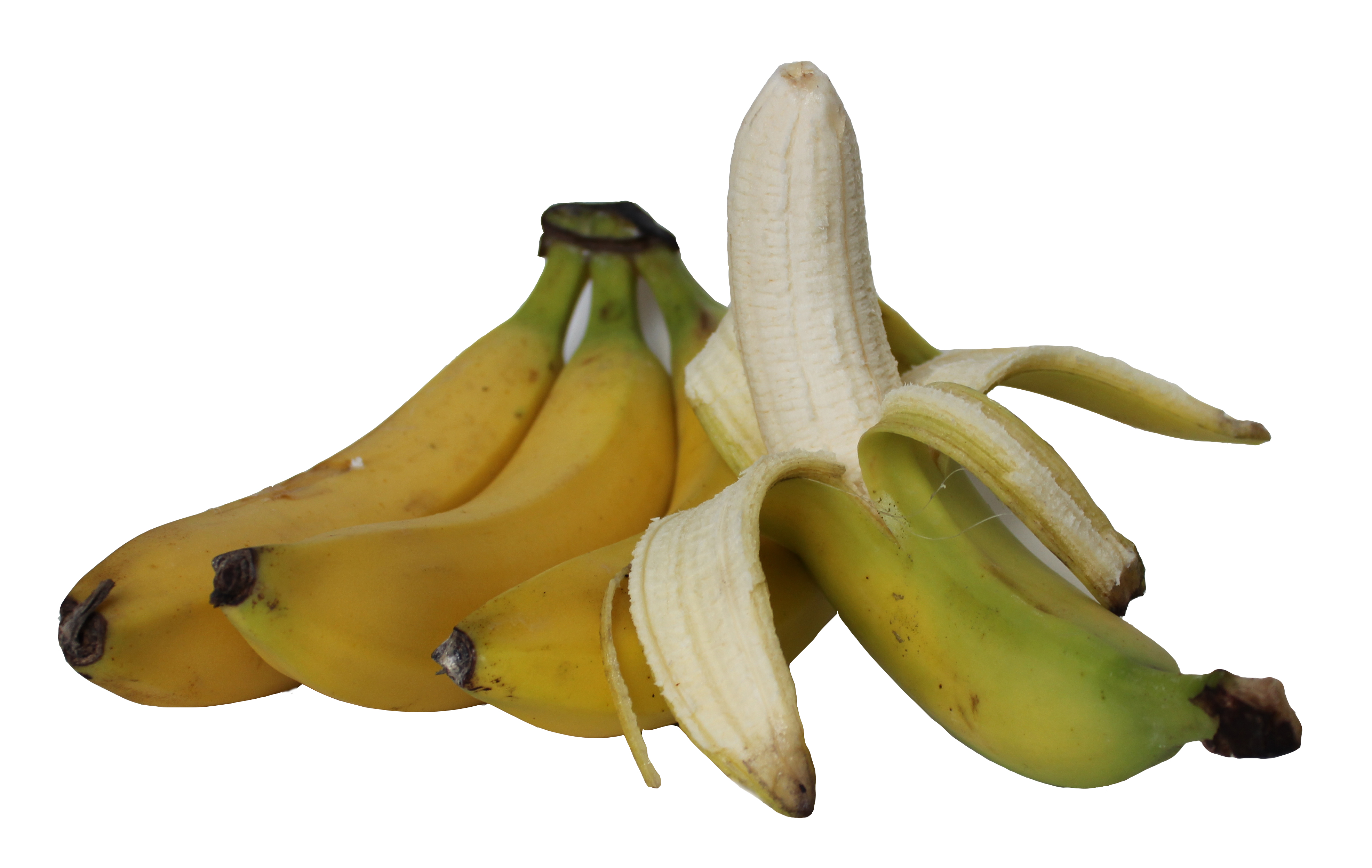 Banane